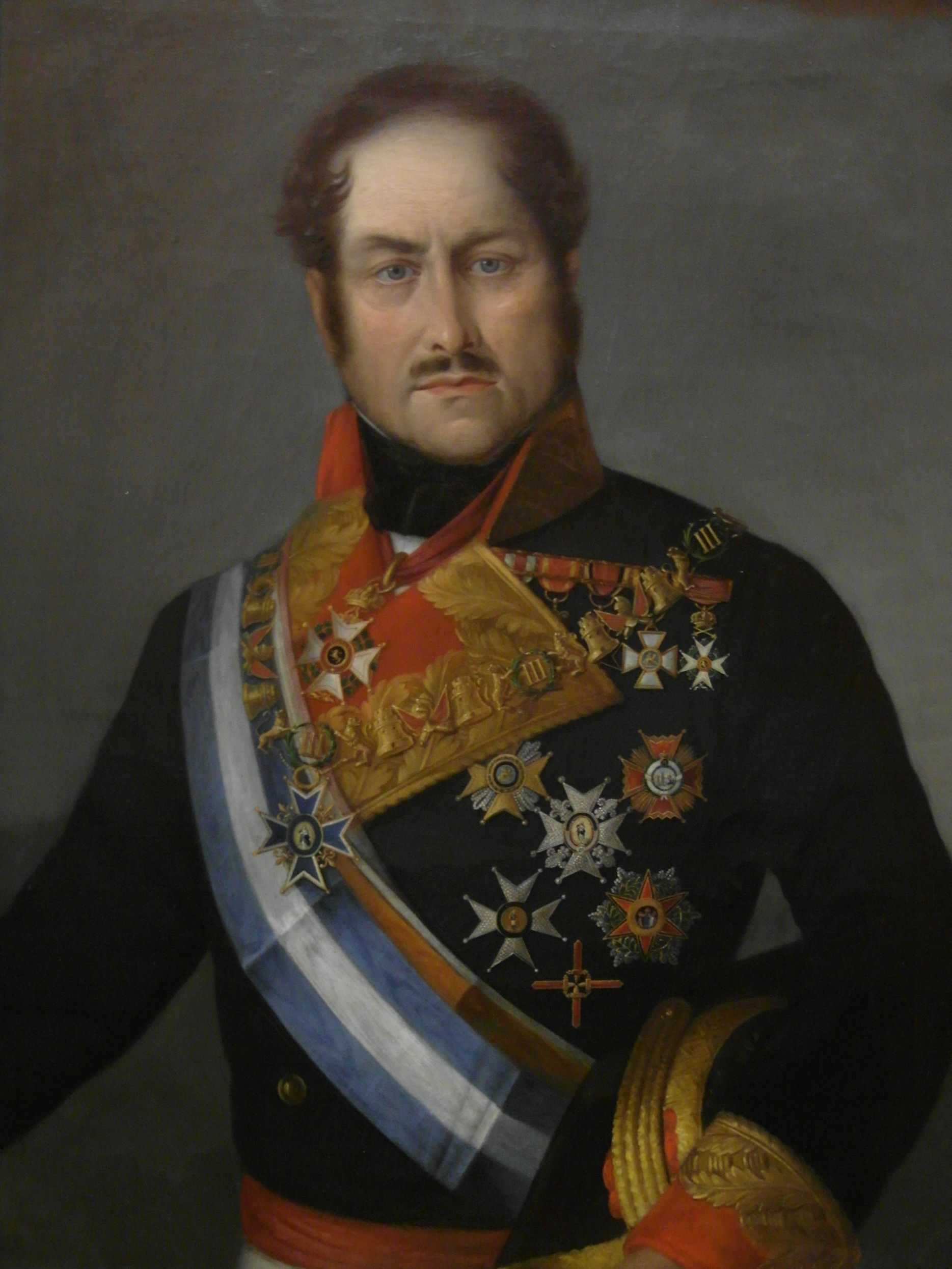 Retrato del aristócrata y militar Juan Van Halen y Sartí (1788-1864), que fue alférez de navío de la Real Armada Española, mariscal de campo del ejército español, mayor de caballería del ejército imperial ruso y teniente general del ejército belga. El retratado aparece de frente, vistiendo el uniforme grande de mariscal de campo español, y con el collar de la Orden de Carlos III y la encomienda de la Orden de Leopoldo I de Bélgica, así como las bandas y placas de las grandes cruces de las órdenes de Carlos III, Isabel la Católica y San Hermenegildo, las cruces de primera y tercera clase de la Orden de San Fernando por servicios distinguidos, la placa de Hierro a los defensores de Bruselas, y el pasador de caballero de la orden de Leopoldo I, junto con la cruz sencilla de San Hermenegildo y otras. El retrato fue donado al Museo Naval de Madrid por el propio Juan Van Halen alrededor de 1853.